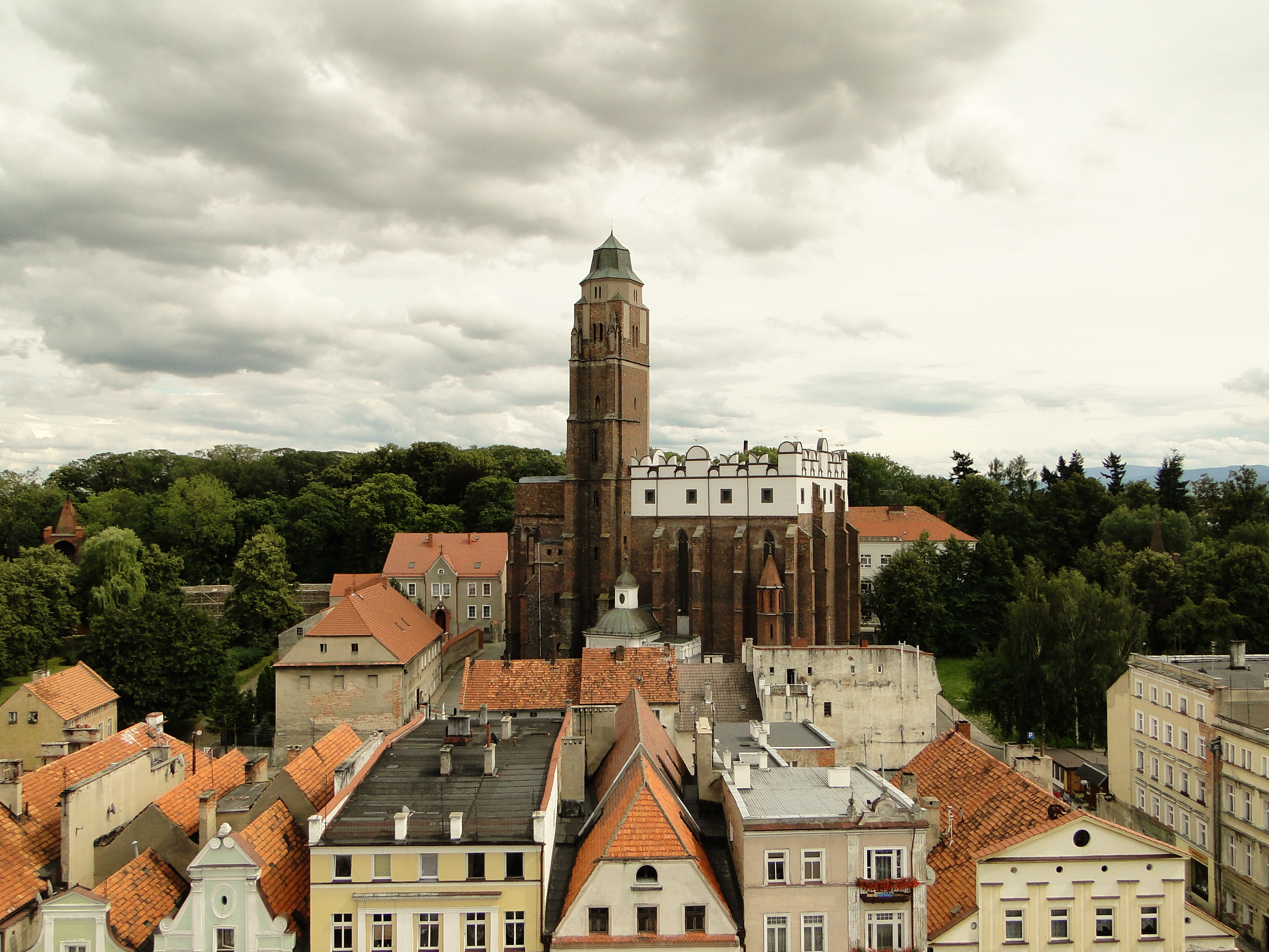 Widok z galerii widokowej na wieży ratusza na kościół parafialny w Paczkowie.